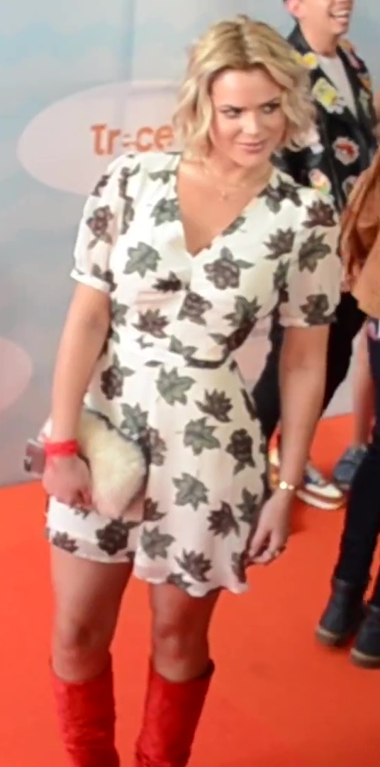 Isabella Castillo en la alfombra naranja de los Kids' Choice Awards Colombia 2017